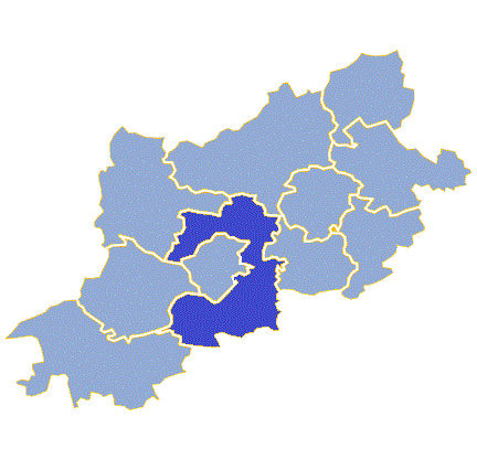 Obszar gminy wiejskiej Zielona Góra, od 1 stycznia 2015 przyłączonej do miasta Zielona Góra